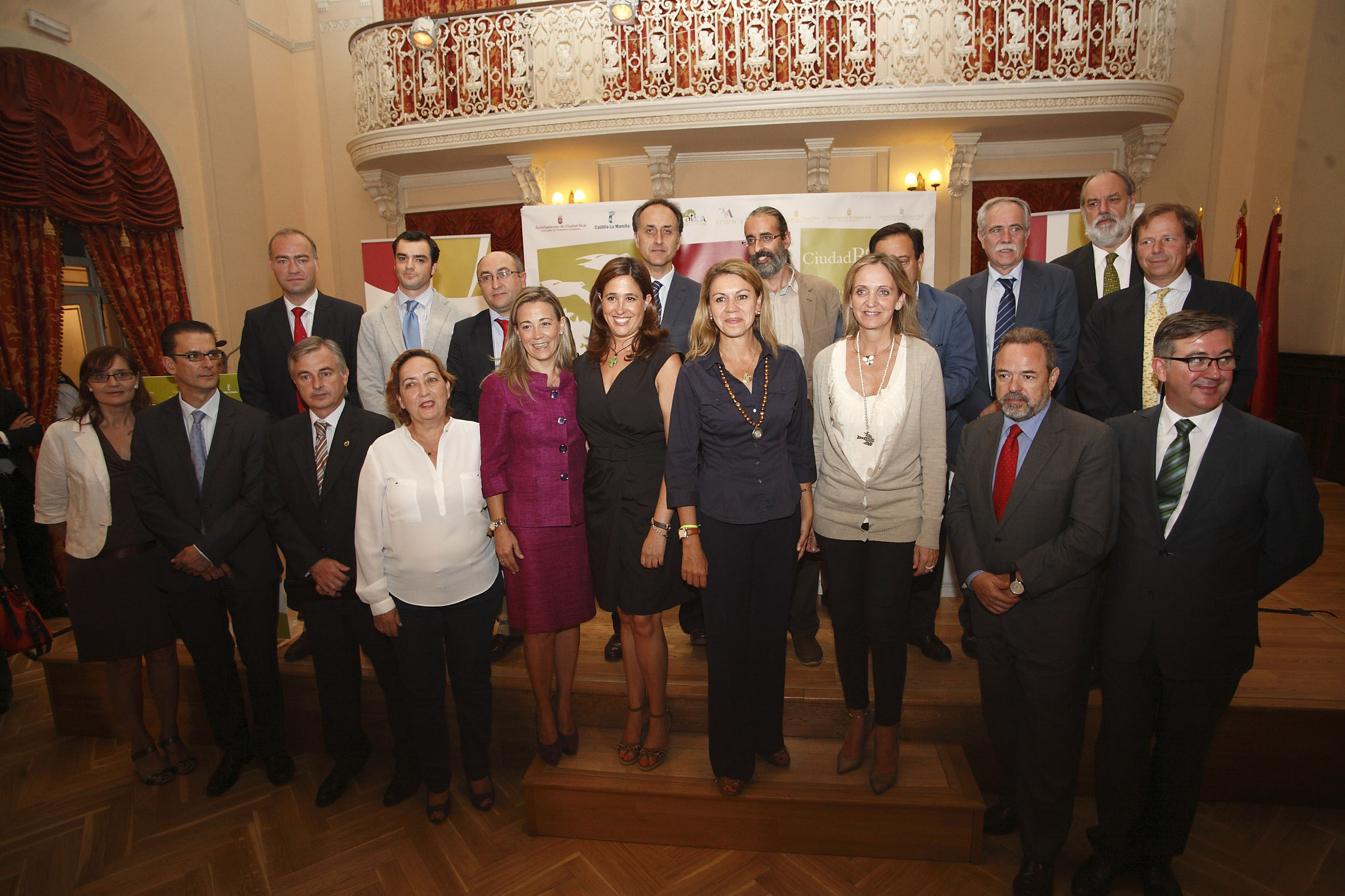 La presidenta, María Dolores Cospedal, inaugura Jornadas Técnicas Turismo Cinegético